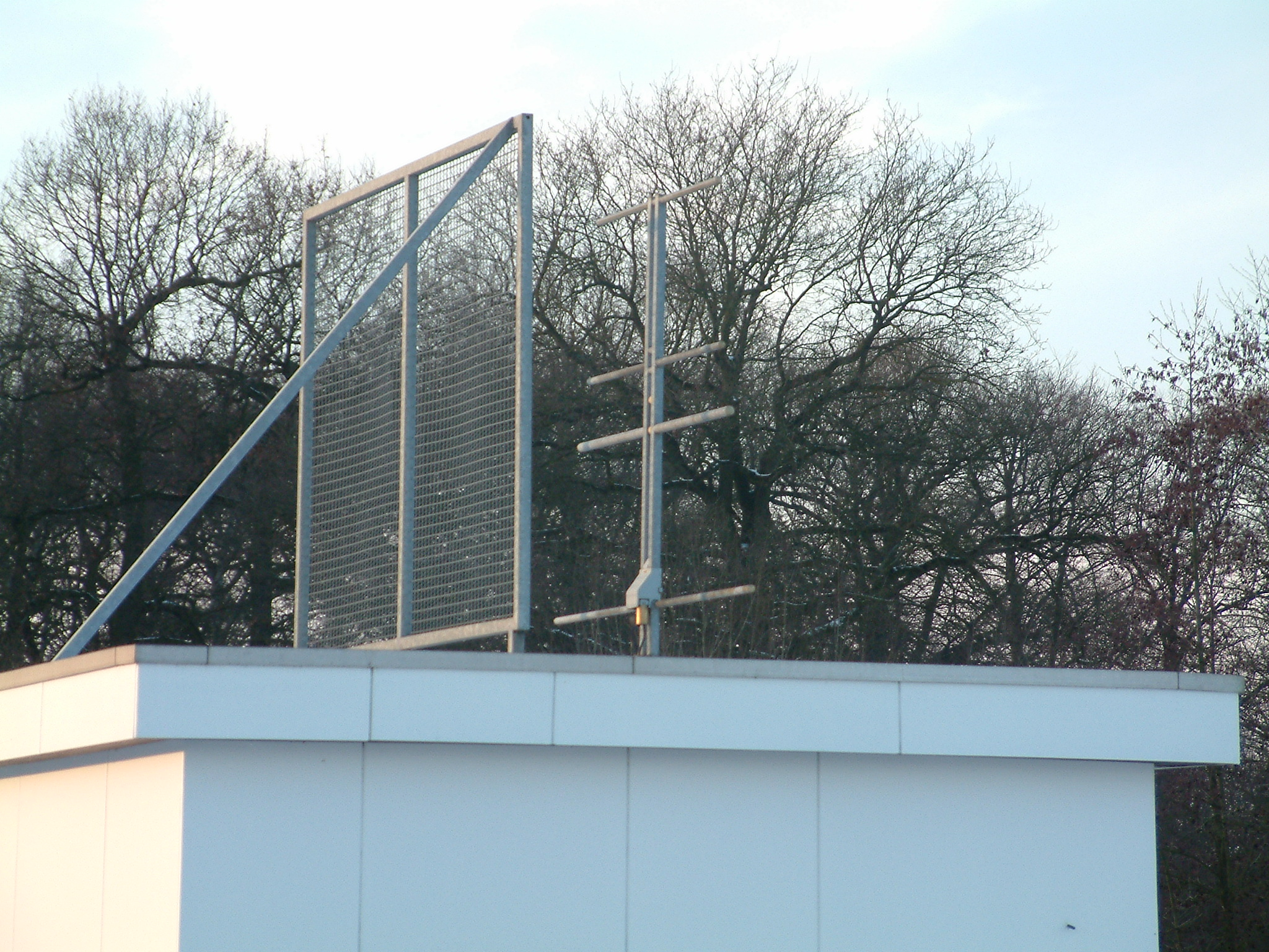 Middle Marker Sender am Flugplatz Hannover EDDV für die Landebahn 09L. Das Gitter neben der Antenne vermindert Störungen zur Parallelbahn 09R.